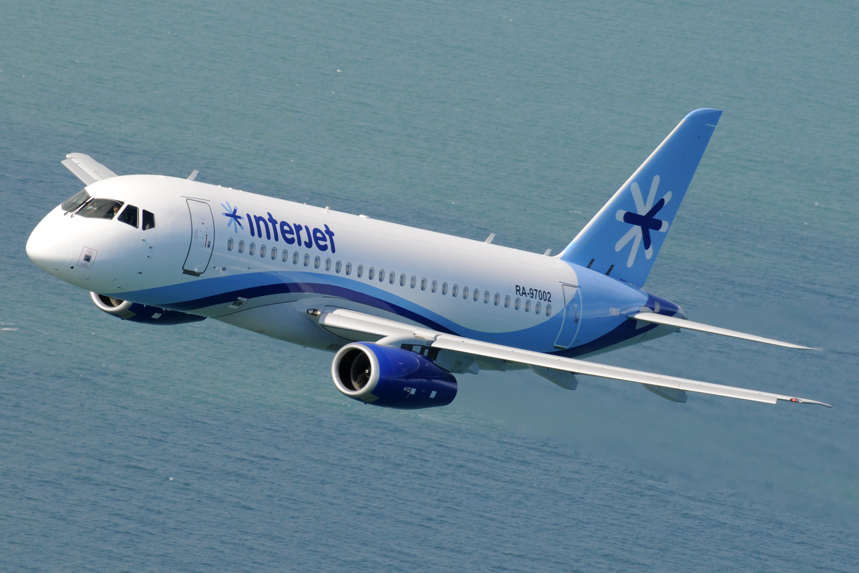 SSJ100 for Interjet